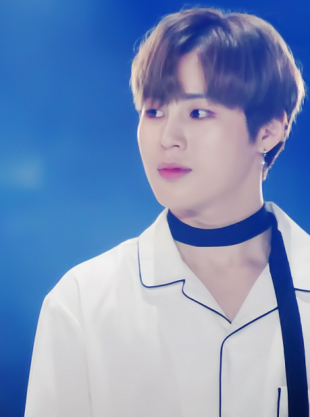 171022 부산원아시아페스티벌 하성운